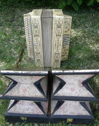 Harmonia pedałowa prod. Ignacy Mielnicki